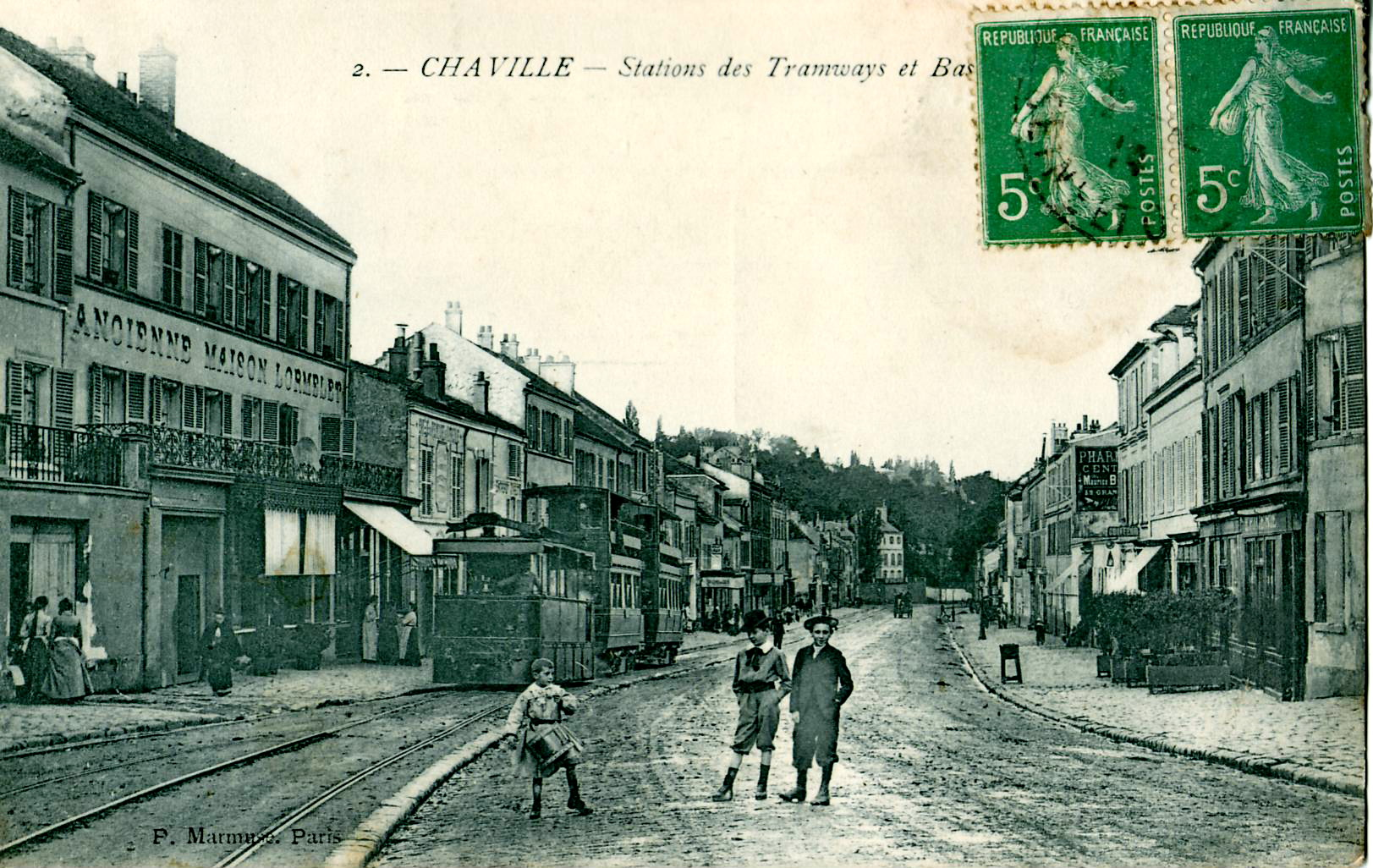 Carte postale ancienne éditée par Marmuse, N°2CHAVILLE : Station des tramwaysOn voit en gros plan une rame du tramway de Sèvres à Versailles tracté par une locomotive type Mékarski, peut-être transformée à cette époque pour fonctionner à la vapeur et non plus à l'air comprimé